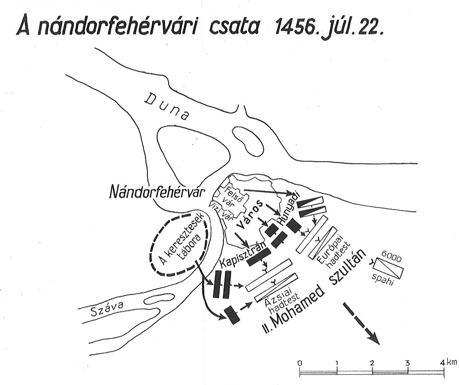 Bánlaky József: A magyar nemzet hadtörténelme. Nándorfehérvár ostroma. 1456. július 22.